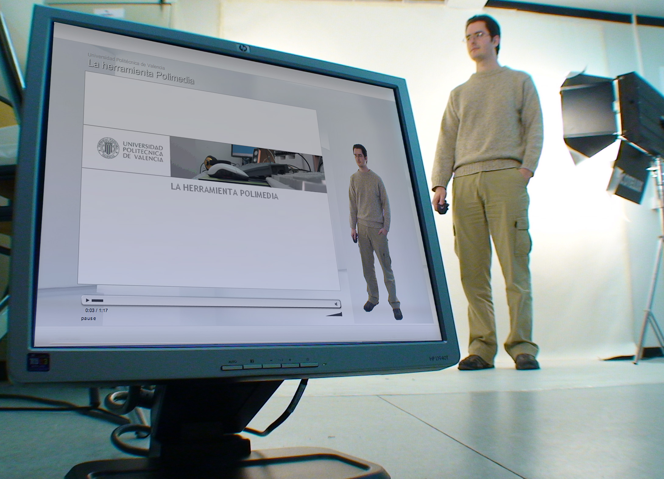 Vista del estudio Polimedia